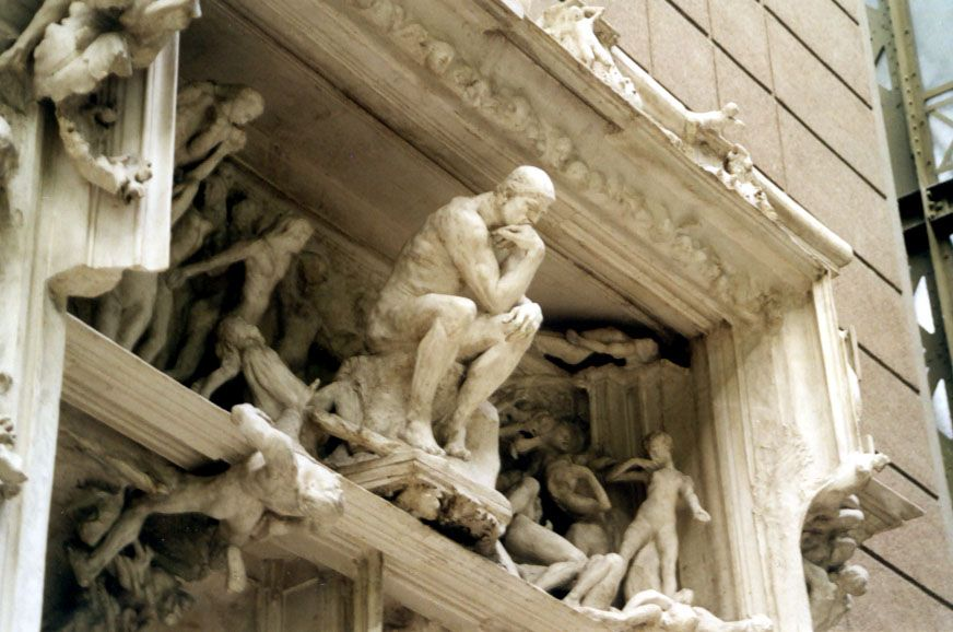 Auguste Rodin Höllentor Detailaufnahme gr